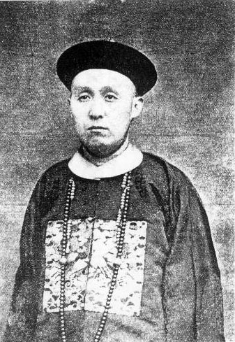 寶熙，晚清宗室。光緒十八年進士